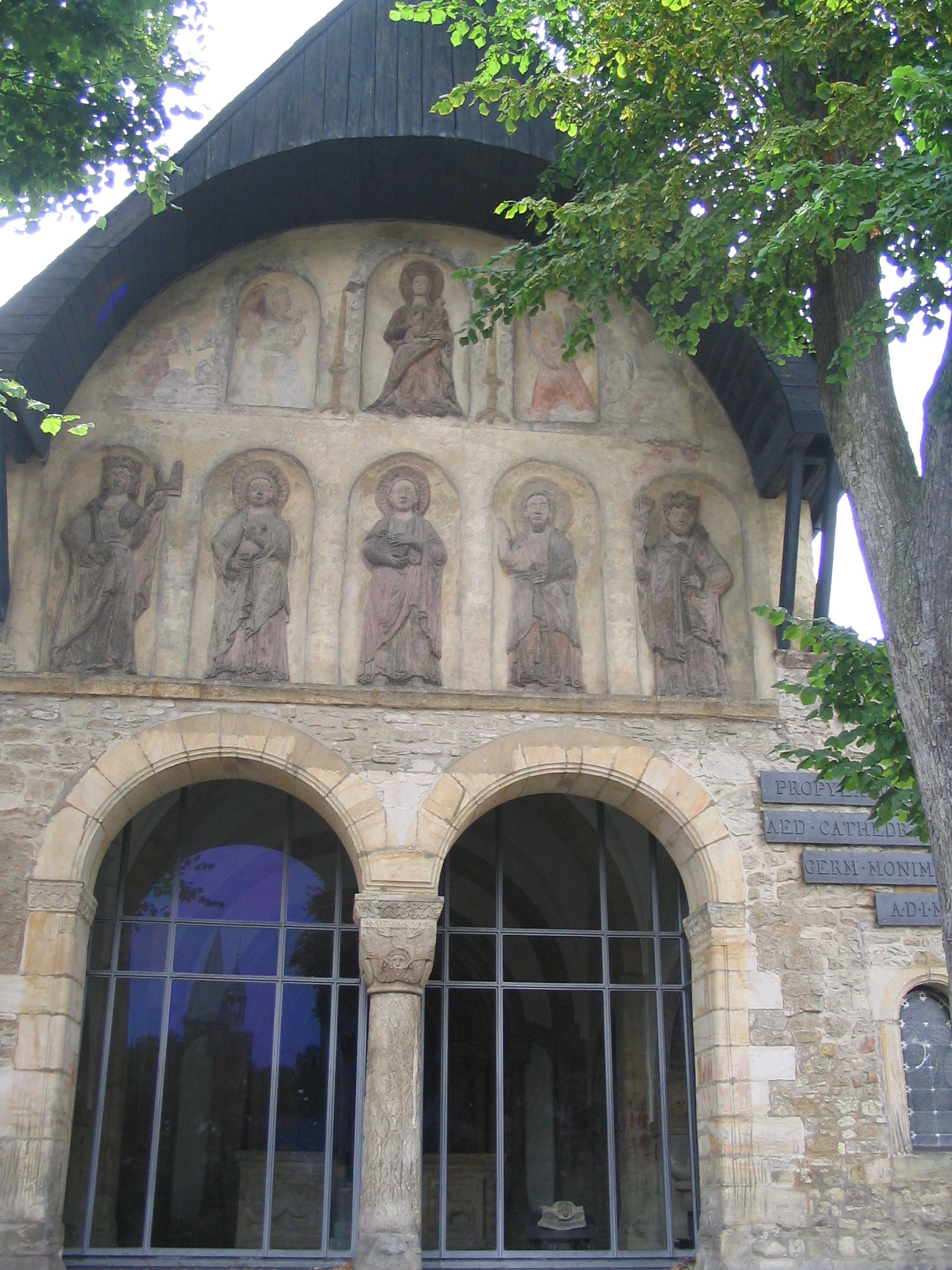 Domvorhalle Goslar